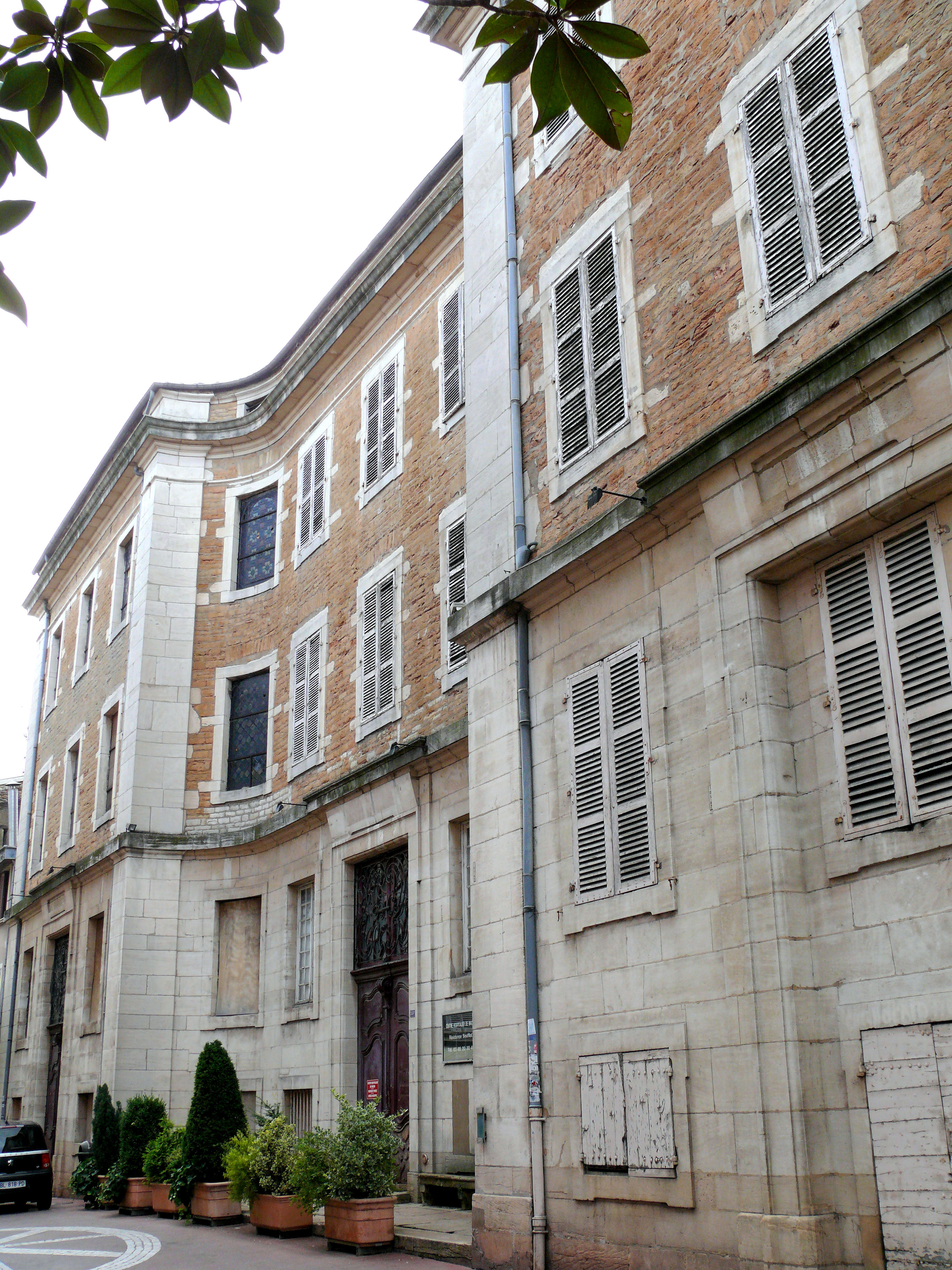 Mâcon - Hospice de la Charité - Façade rue Carnot